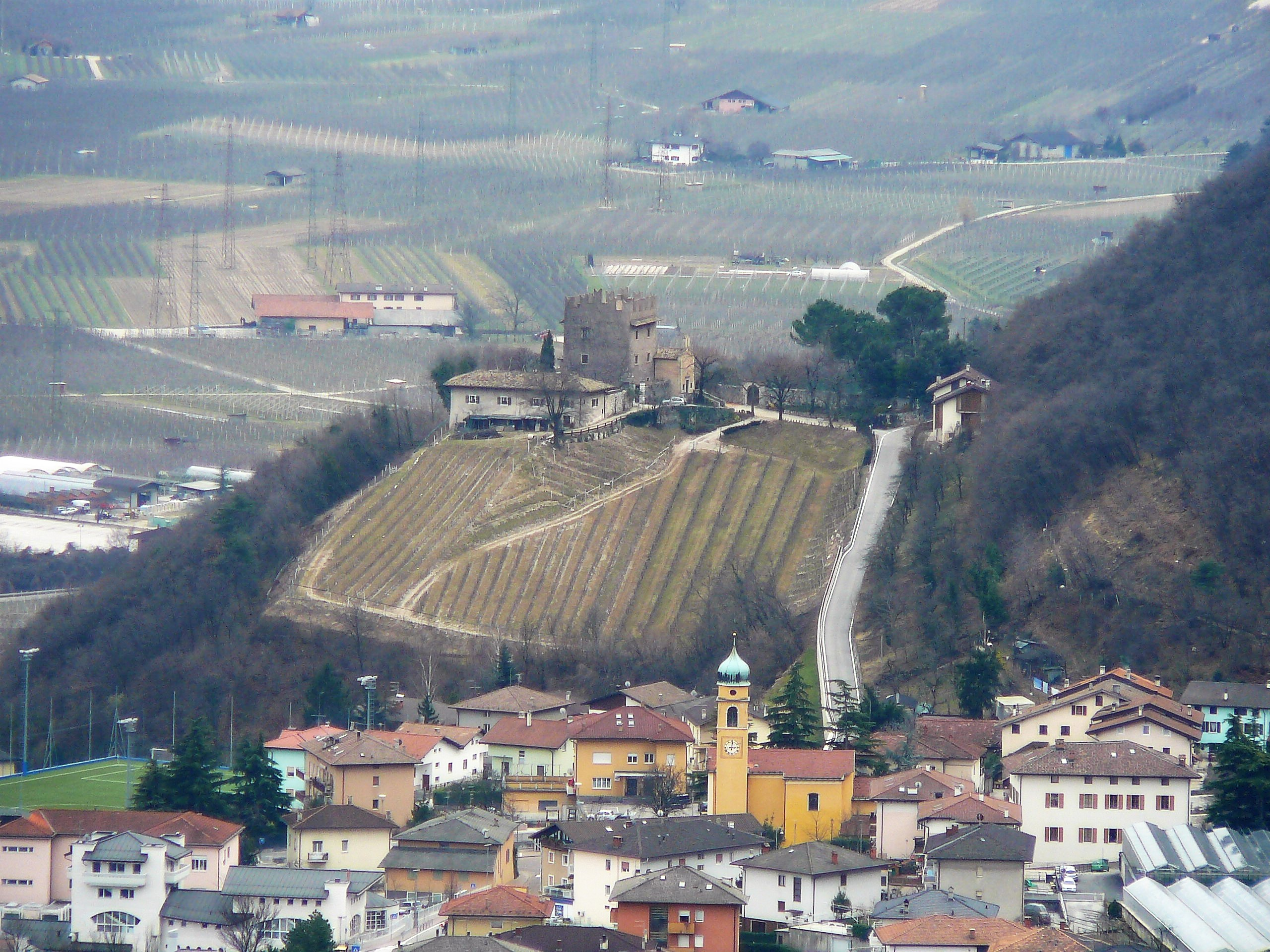 Le Torri di Ravina